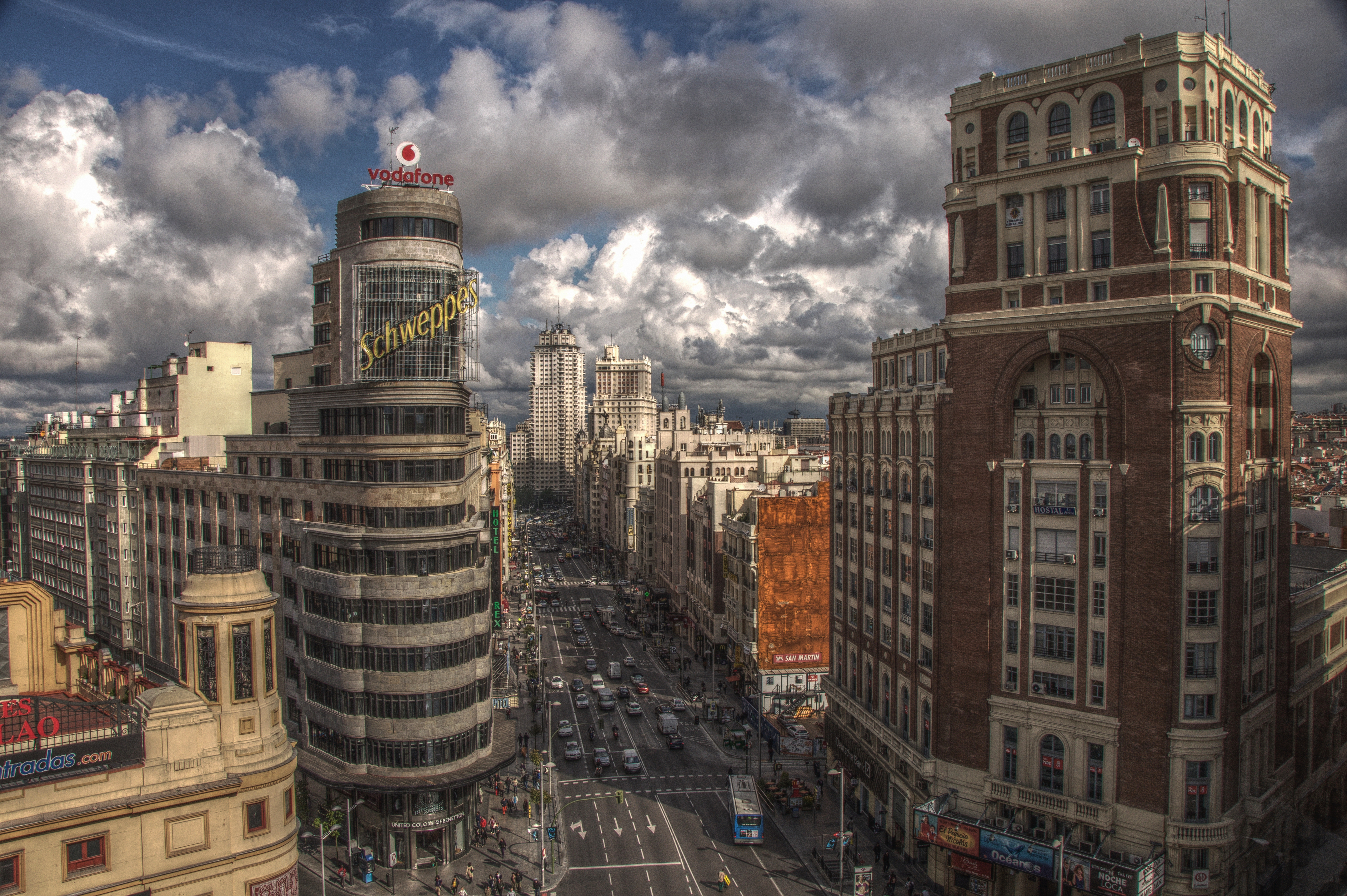 Gran Vía, Madrid. Vista general. A la derecha el Palacio de la Prensa. 2010